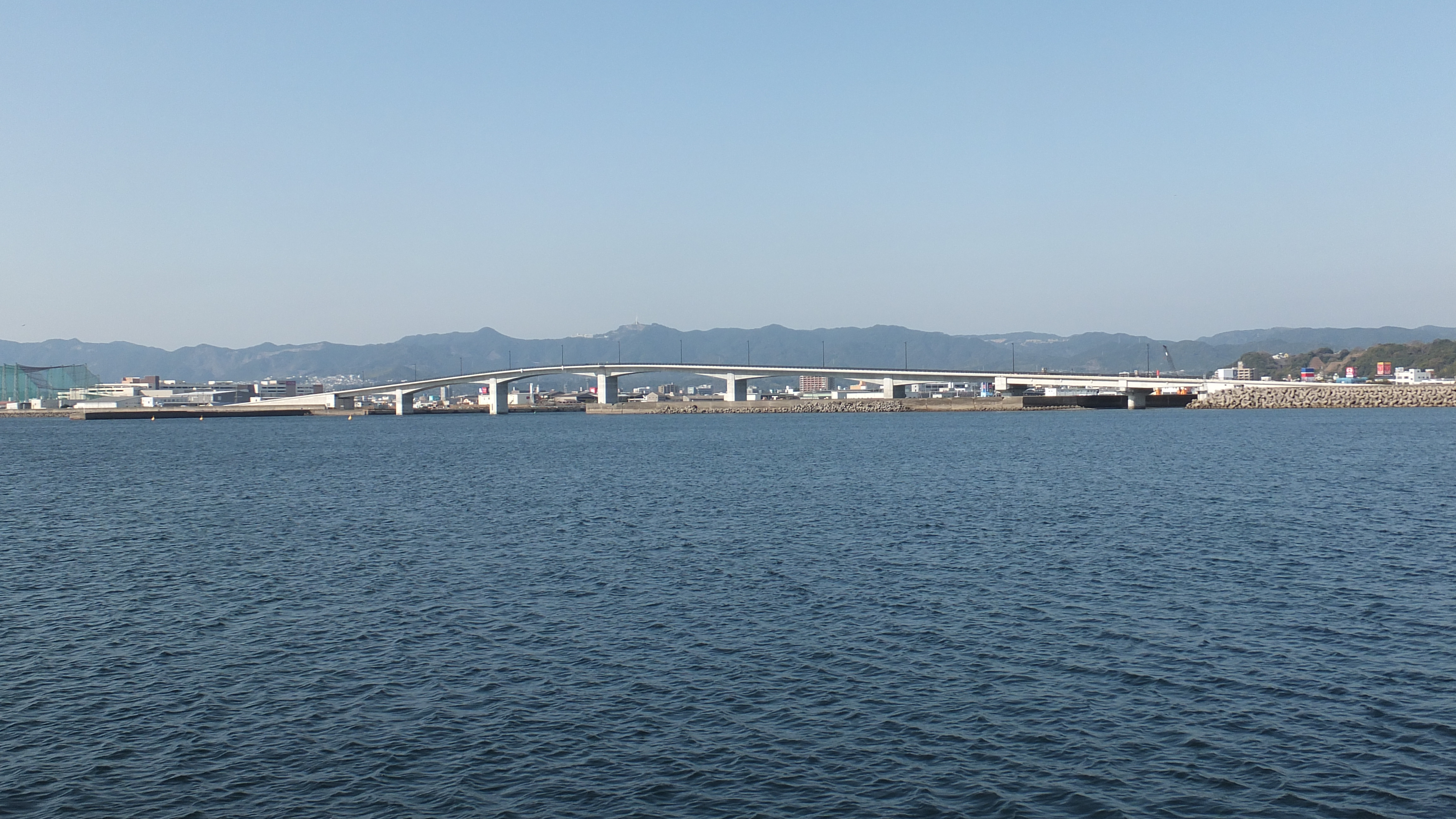 黎明みなと大橋の画像 鹿児島マリンポート より撮影